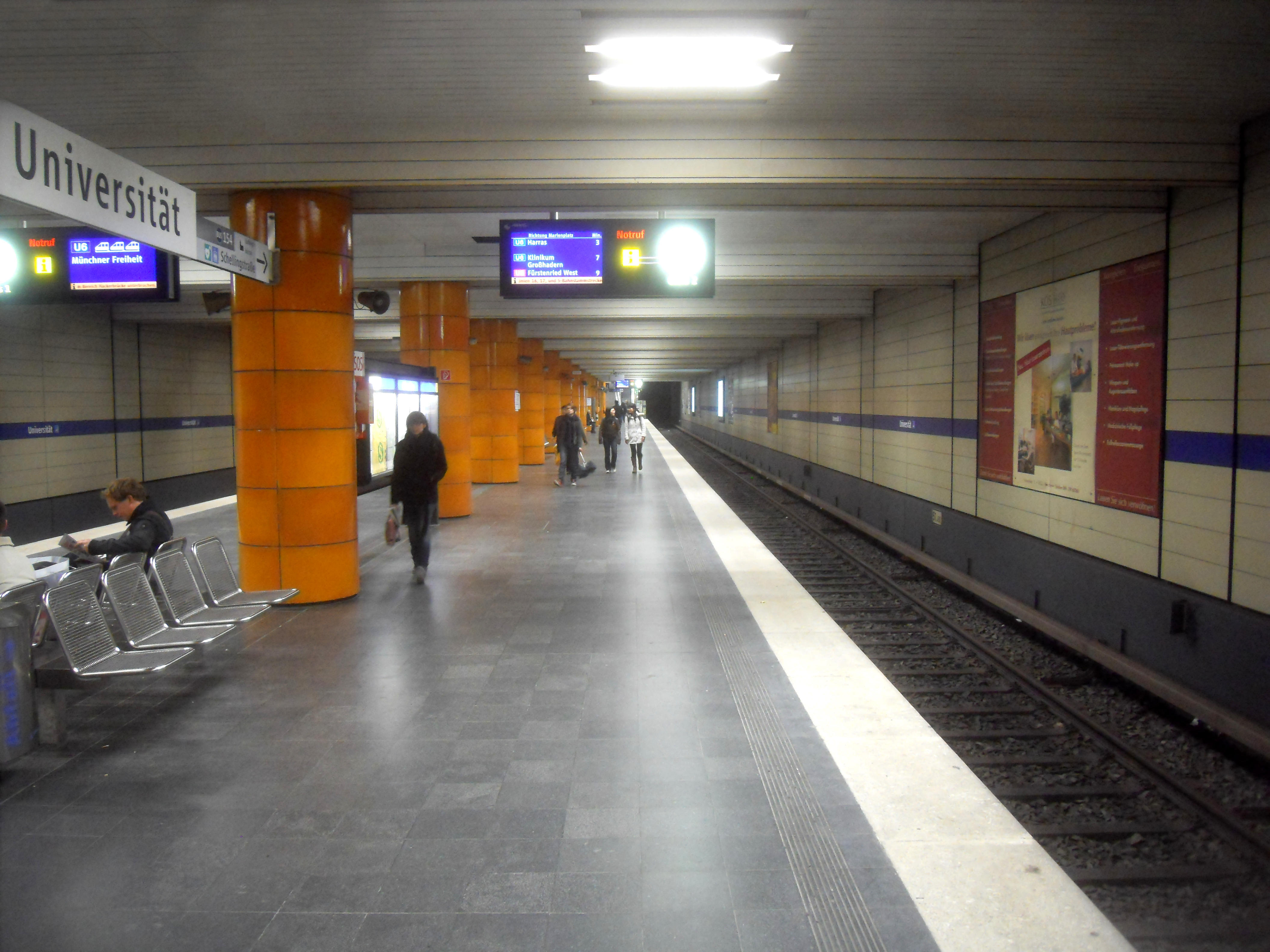 Die Bahnsteiganlagen des U-Bahnhofs Universität der U-Bahn München auf den Linien U 3 und U 6 in Bayern (Deutschland)